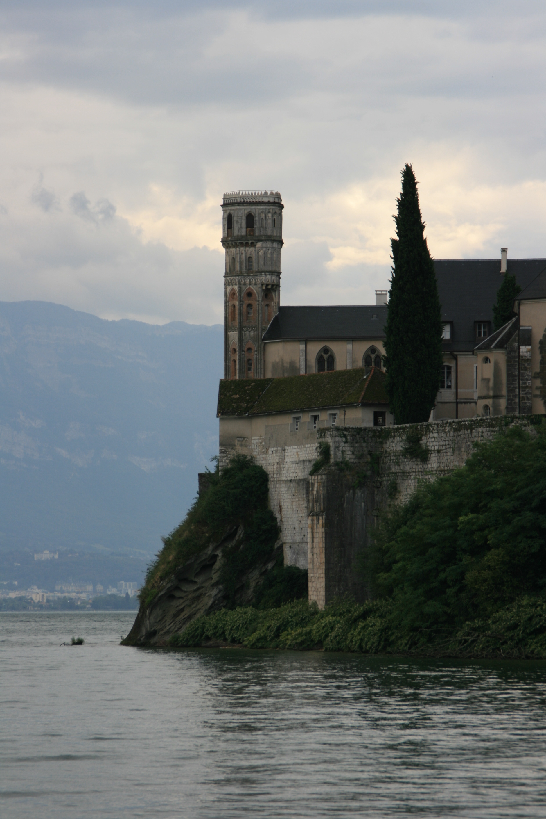 Abbaye de Hautecombe aux bords du Lac du Bourget